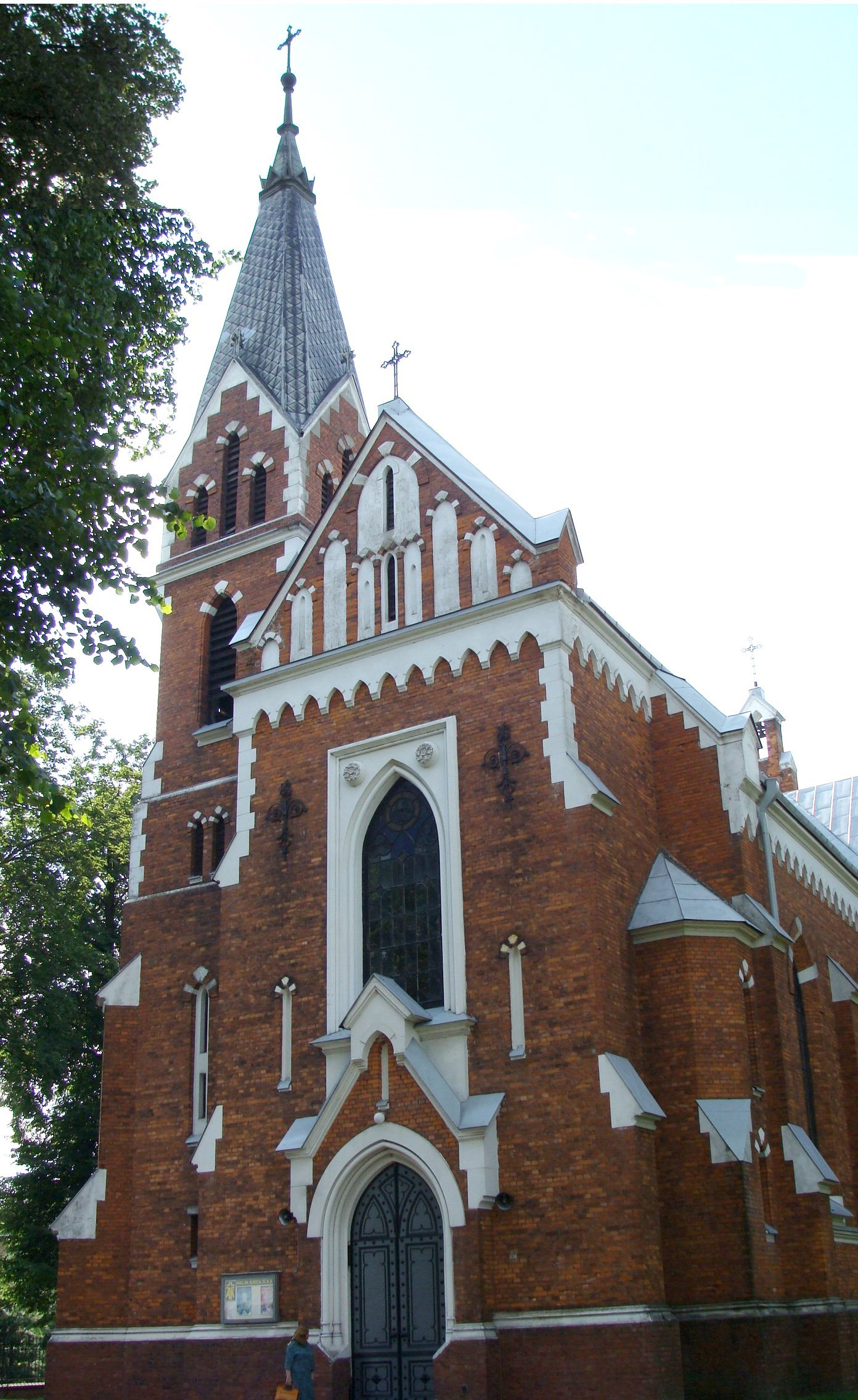 Neogotycki kościół parafialny p.w. św. Jozafata z 1907 r. w Rejowcu (zabytek nr rejestr. A/165 z 6.11.1996)